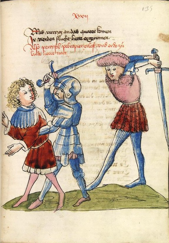 Parzival und Condviramur. Handschrift aus der Werkstatt von Diebold Lauber, Hagenau (15. Jahrhundert), Heidelberg, Cod. Pal. germ. 339, 135r